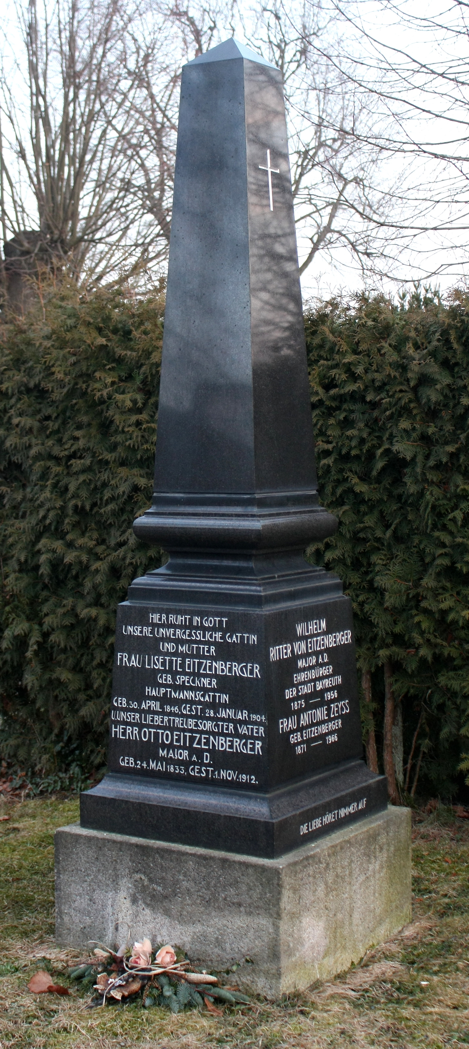 Grabmal der Familie Eitzenberger auf dem Friedhof St.Georgen in Bayreuth